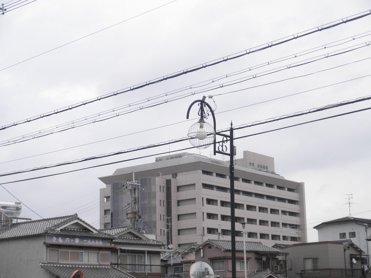 京都山城総合医療センター